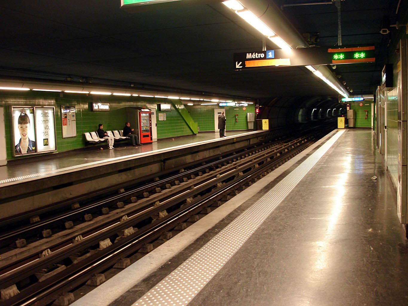 Station La Timone du métro de Marseille, France.